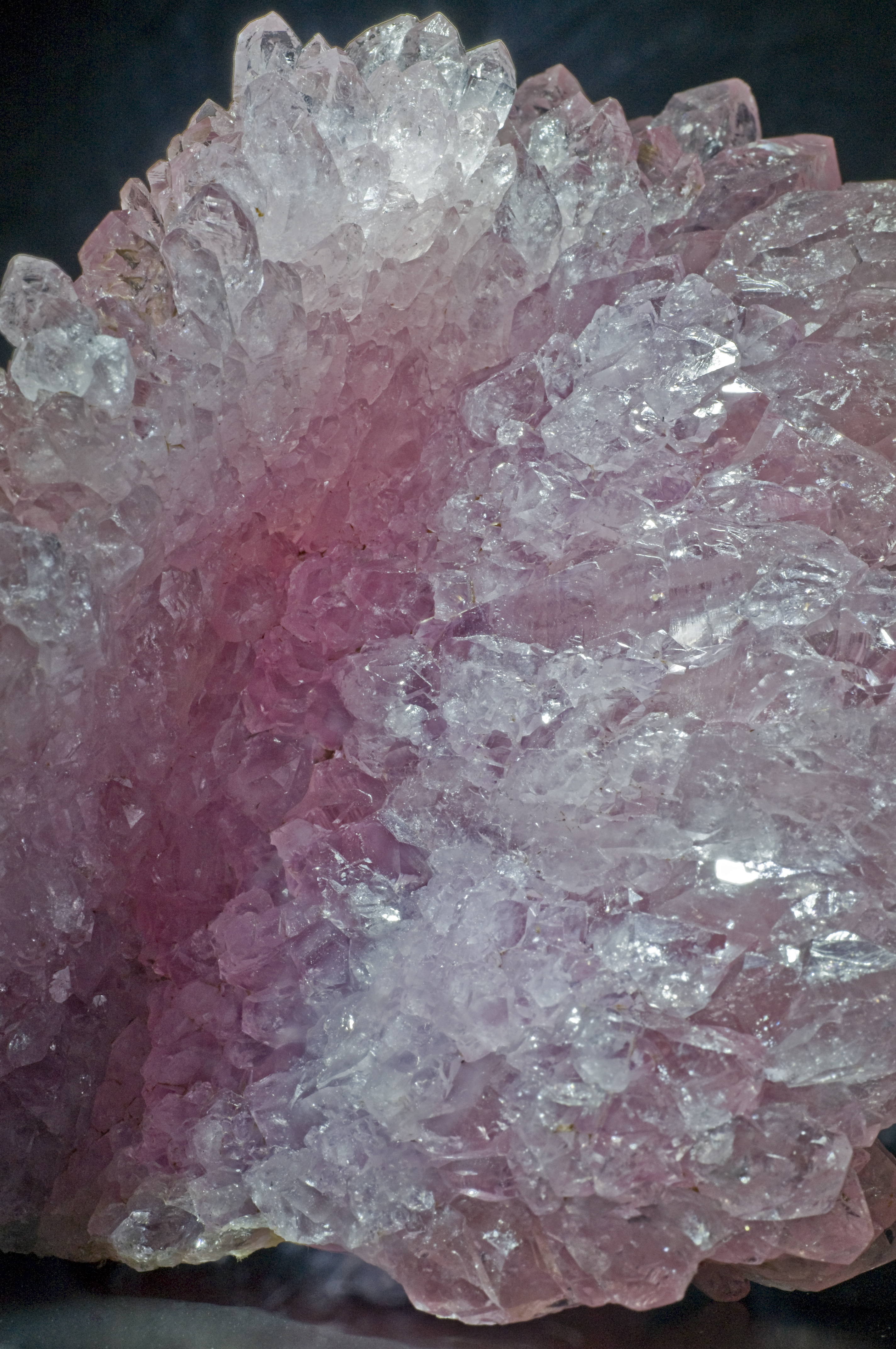 Mineraliensammlung des Naturmuseums Senckenberg Rosa Quarz